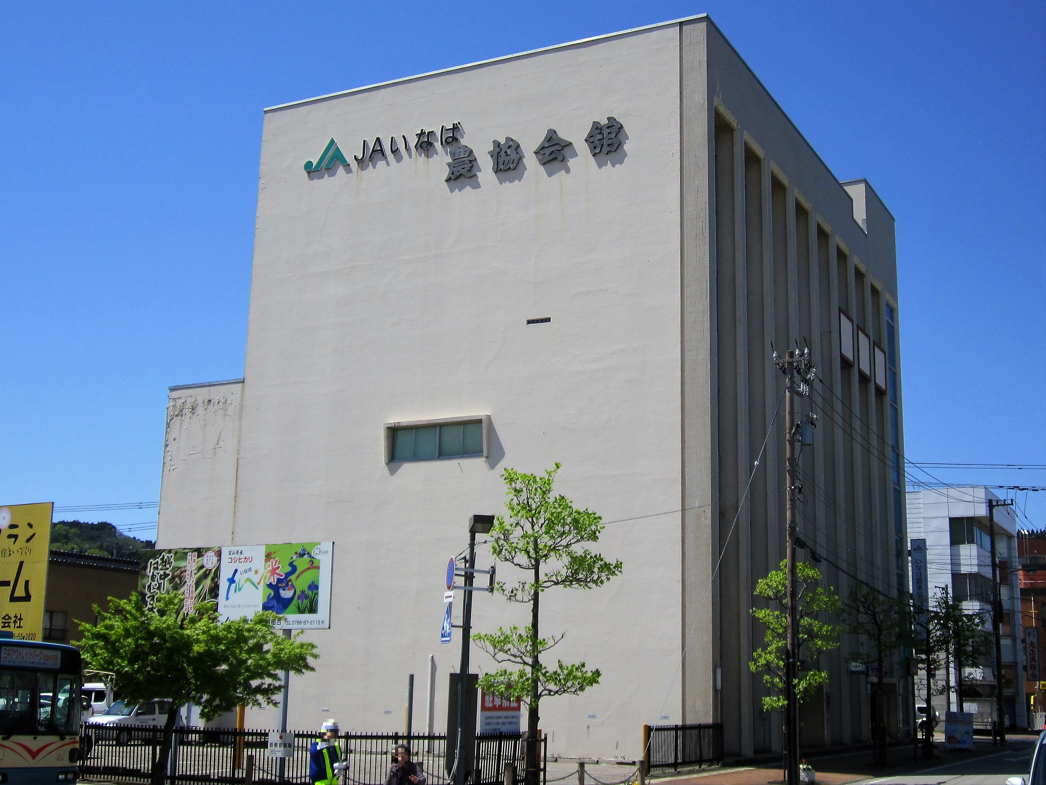 いなば農業協同組合本店（小矢部市石動町） Canon PowerShot A2200